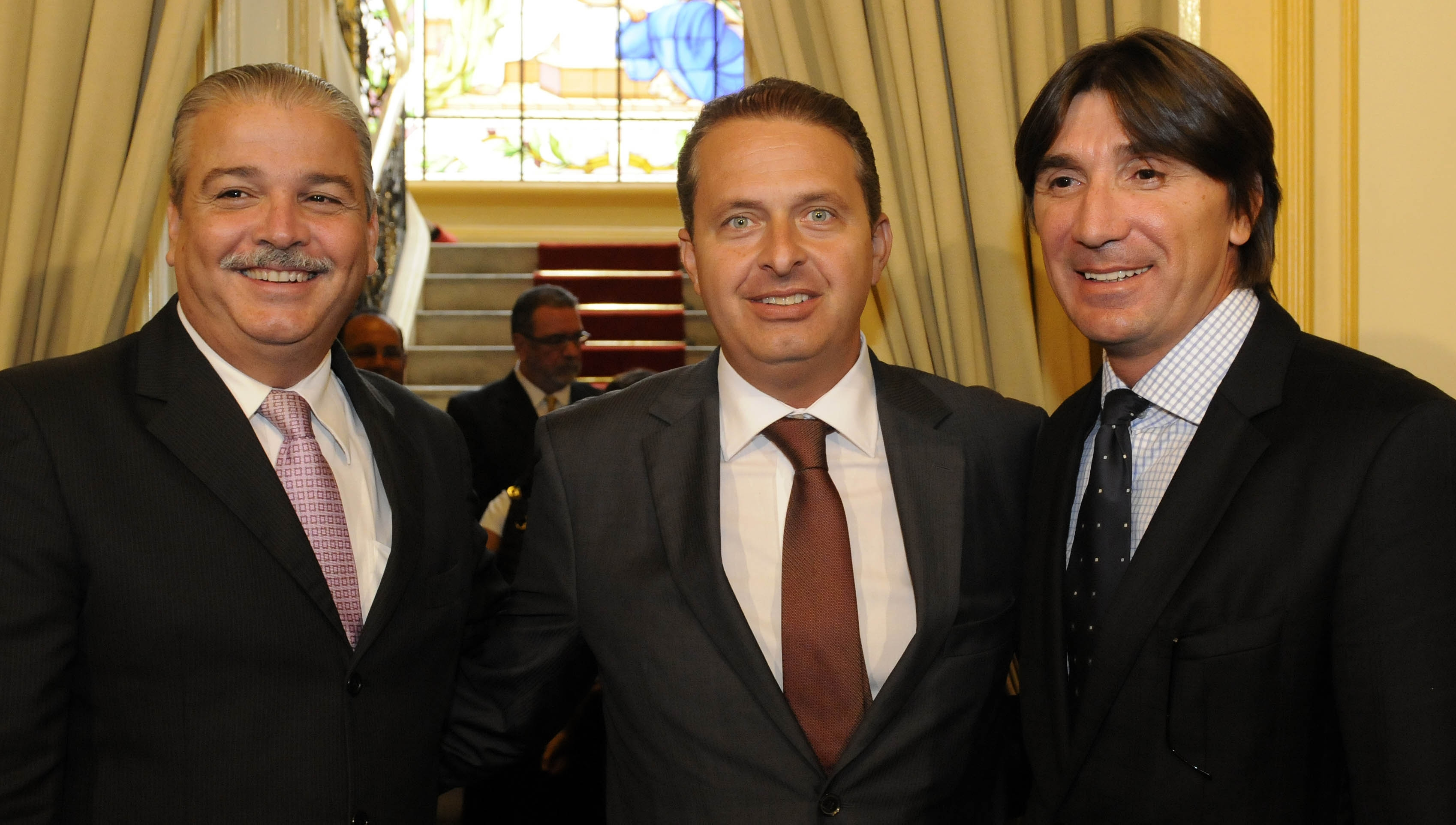 Lançamento FormaSUS em Pernmabuco com Eduardo Campos. Foto: Aluísio Moreira/SEI